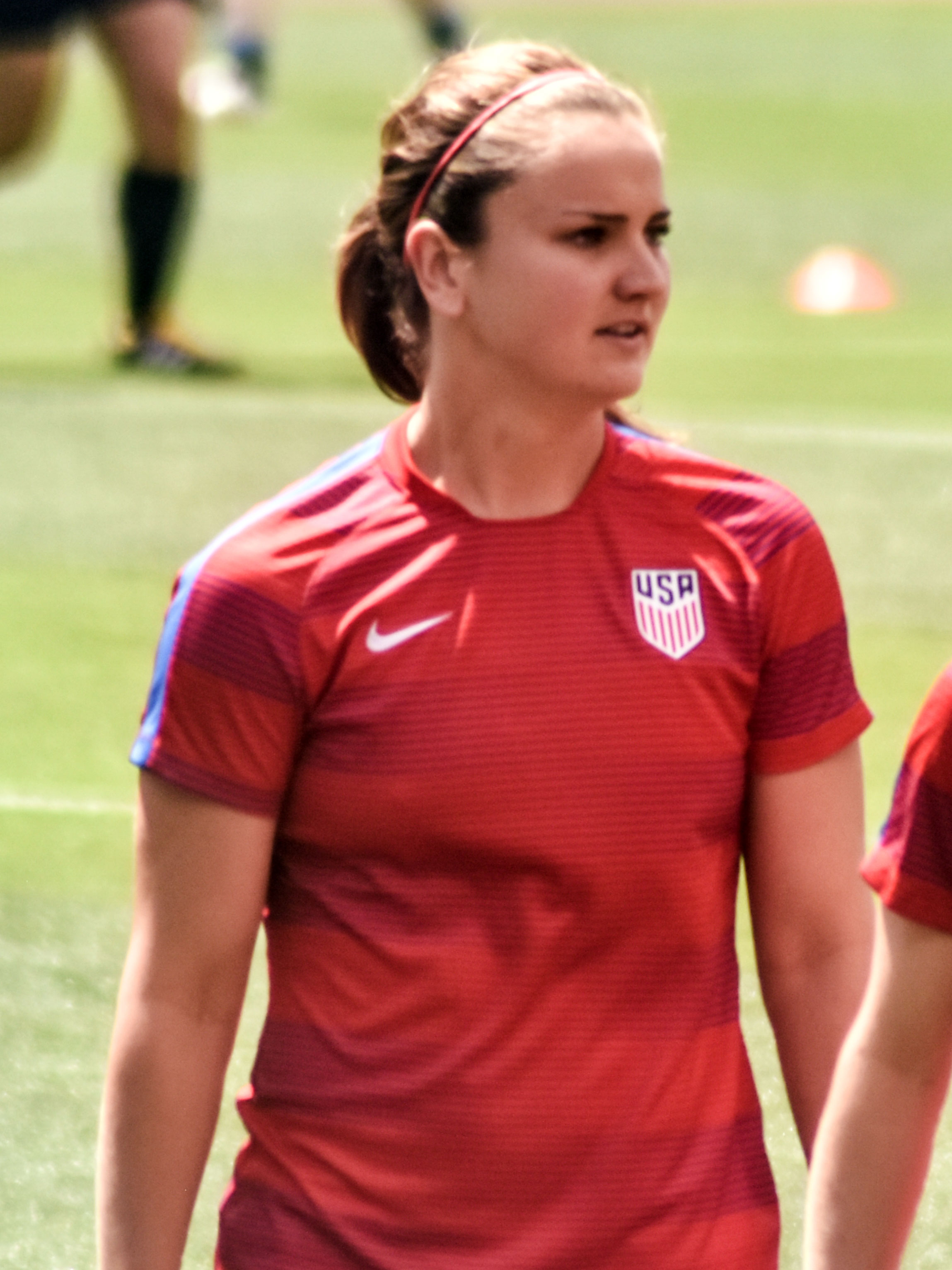 From Flickr user edrost88, match details here